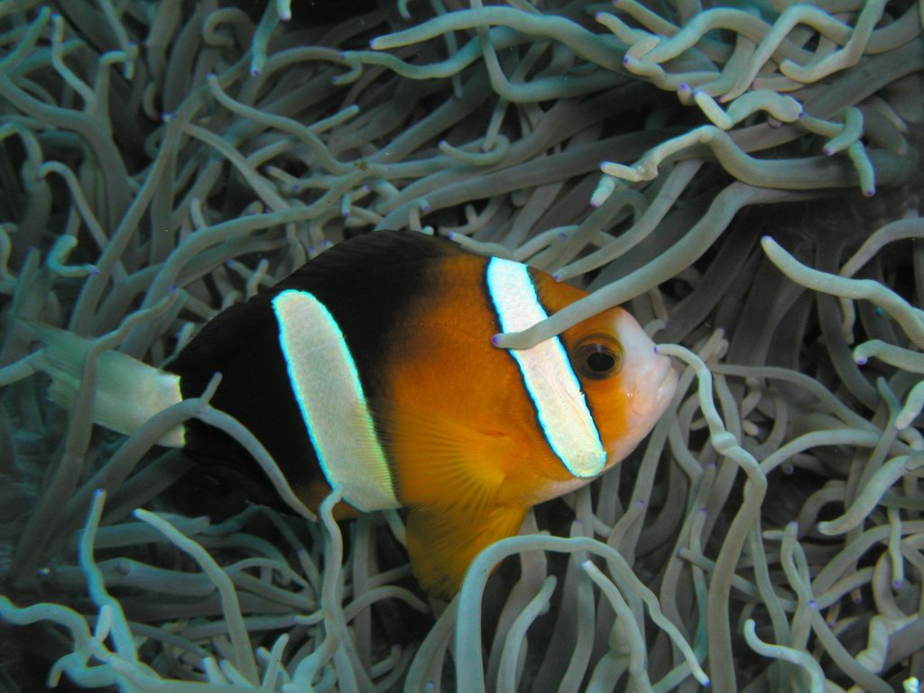 Klarko jūrų klounas.